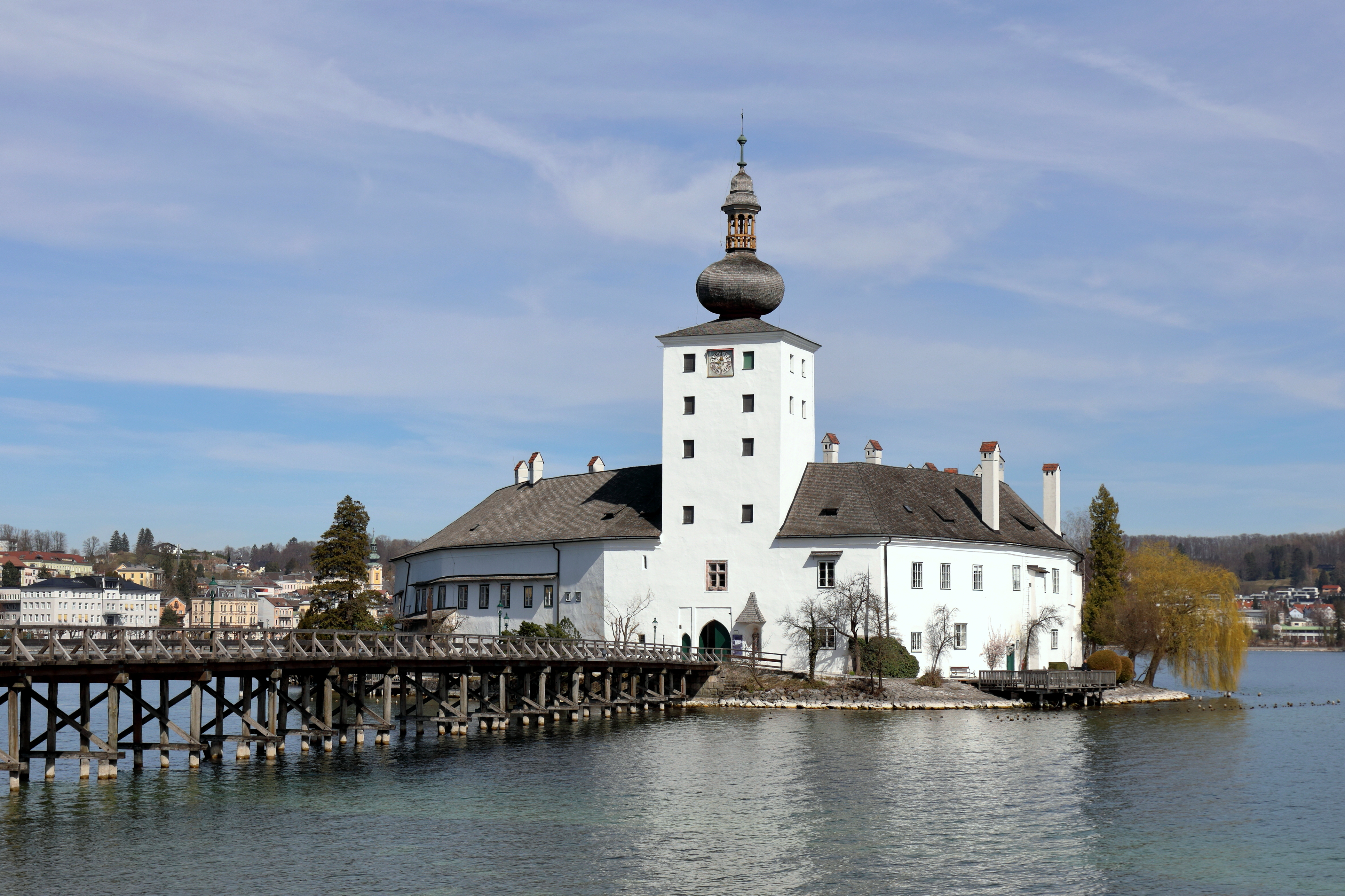 Südwestansicht des Schlosses Ort und im Hintergrund die oberösterreichische Stadtgemeinde Gmunden.Das Schloss befindet sich auf einer Insel im Traunsee und zählt zu den ältesten Gebäuden des Salzkammergutes. Ursprünglich war das Schloss eine Wasserburg, wurde jedoch nach dem Brand 1626 in der heutigen Form wiedererrichtet.